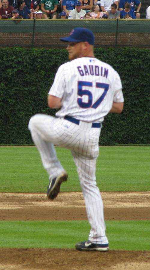 Chad Gaudin